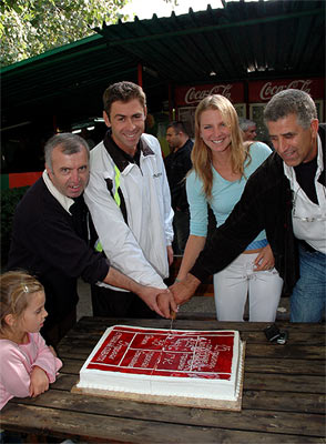 Сесил Каратанчева, Орлин Станойчев и Петър Михнев разрязаха празничната торта; Тенис ски голф клуб "Мир и дружба", София - Родни звезди дават отпечатък; 2007 Пламен Ташев, Тенис